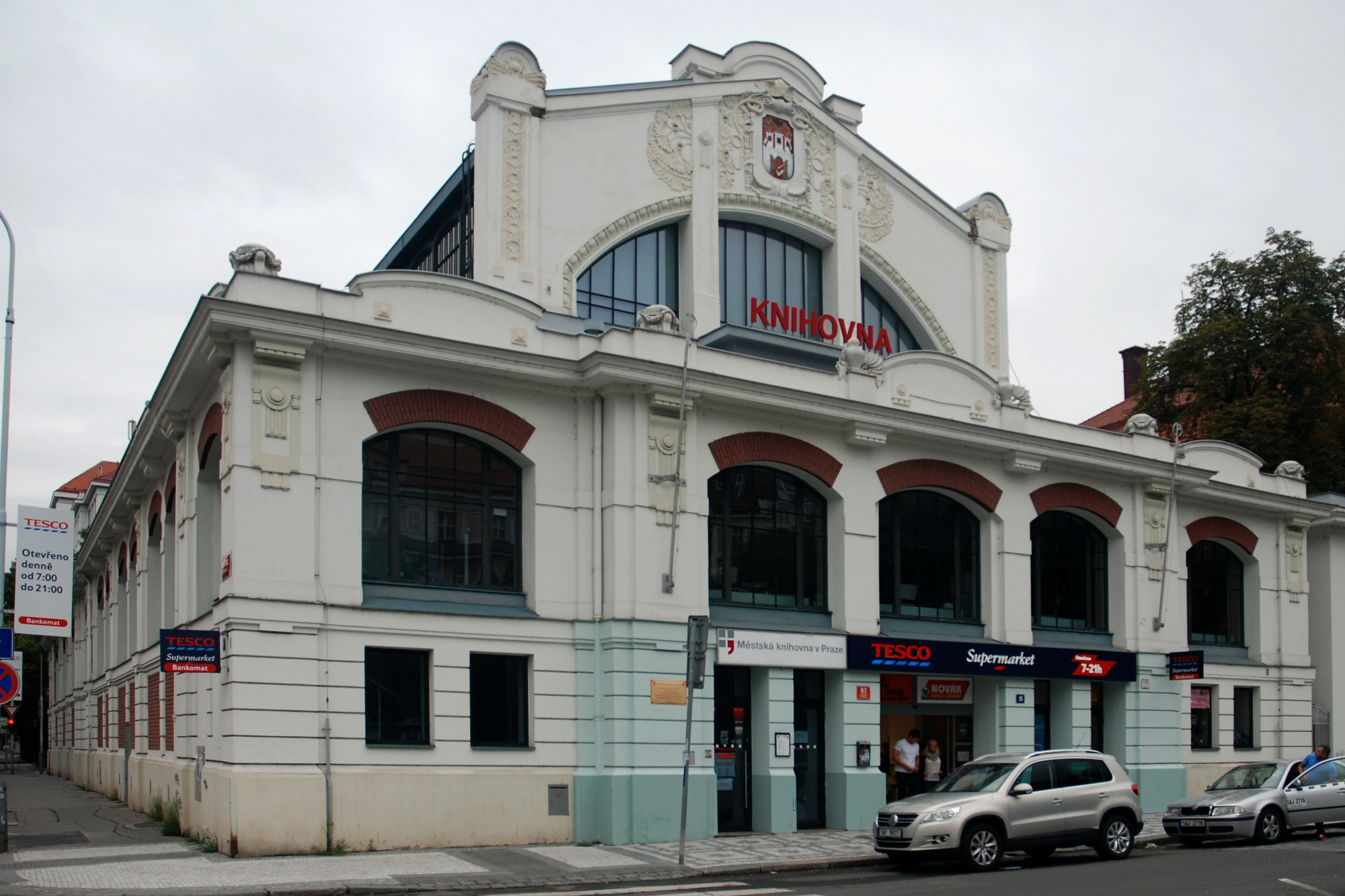 Budova Smíchovské tržince na nám. 14. října v Praze